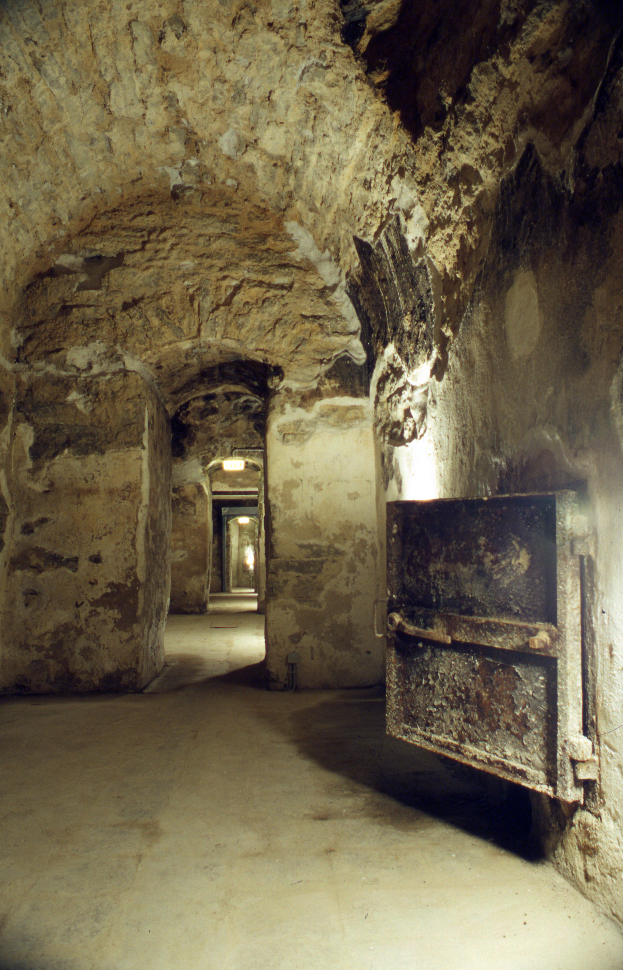 Reg nr. 3015, Harju maakond, Tallinna linn, Kesklinna linnaosa Harjumägi